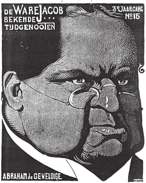 De Ware Jacob. 3e jaargang nr. 16. 16 januari 1904. Tekening van Albert Hahn.